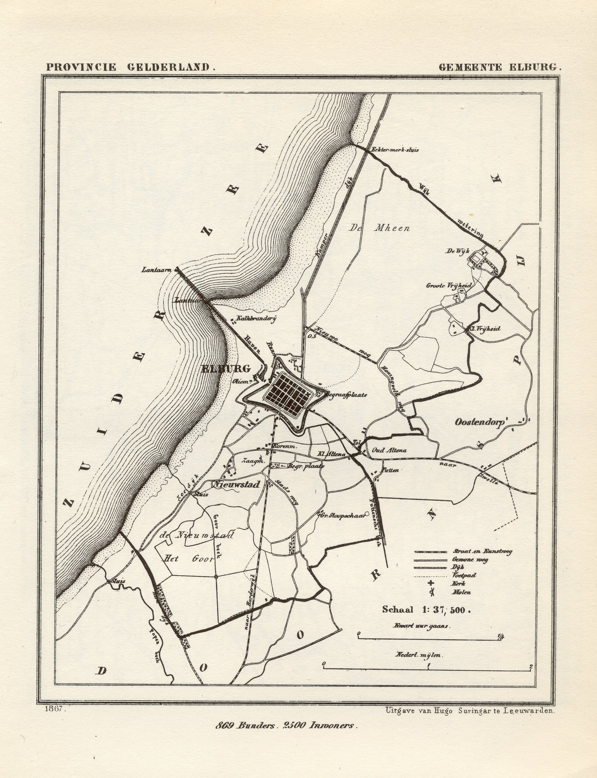 Gemeente Elburg 1867: 869 bunder en 2500 inwoners